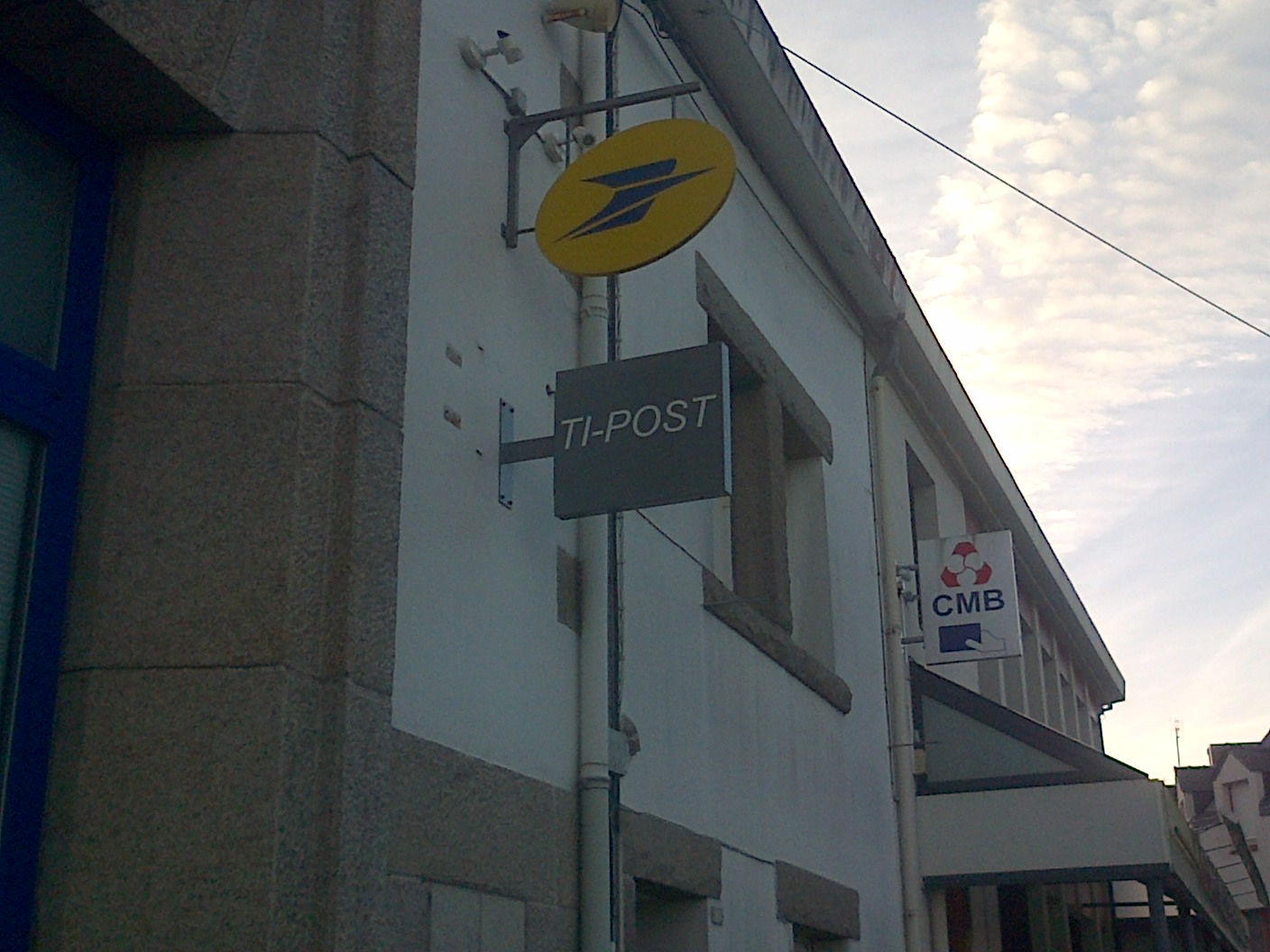 Ti-post Pont 'abad gant ur panel skrivet en Brezhoneg.